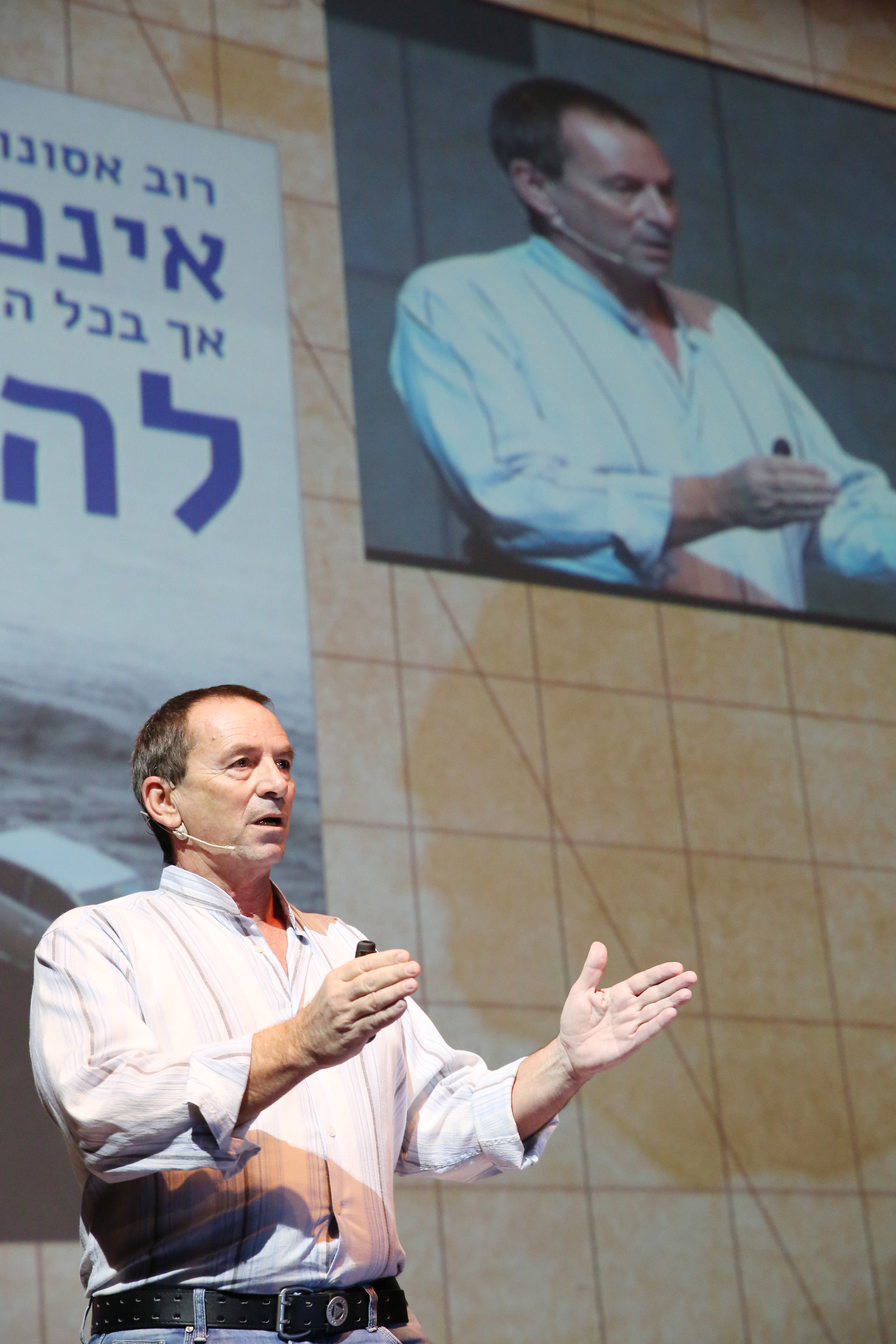 צולם באירוע "אתנחתא" של אוניברסיטת תל אביב